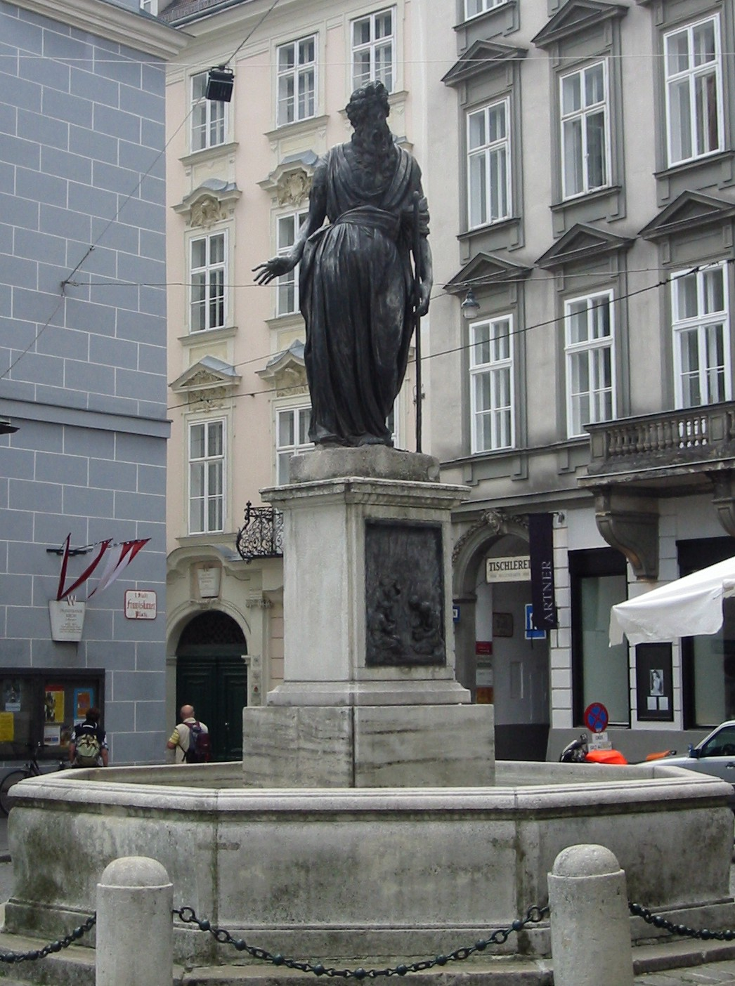 Wien, Mosesbrunnen